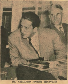 Abelardo Forero Benavides, Semanario Sábado, Junio 18 de 1955